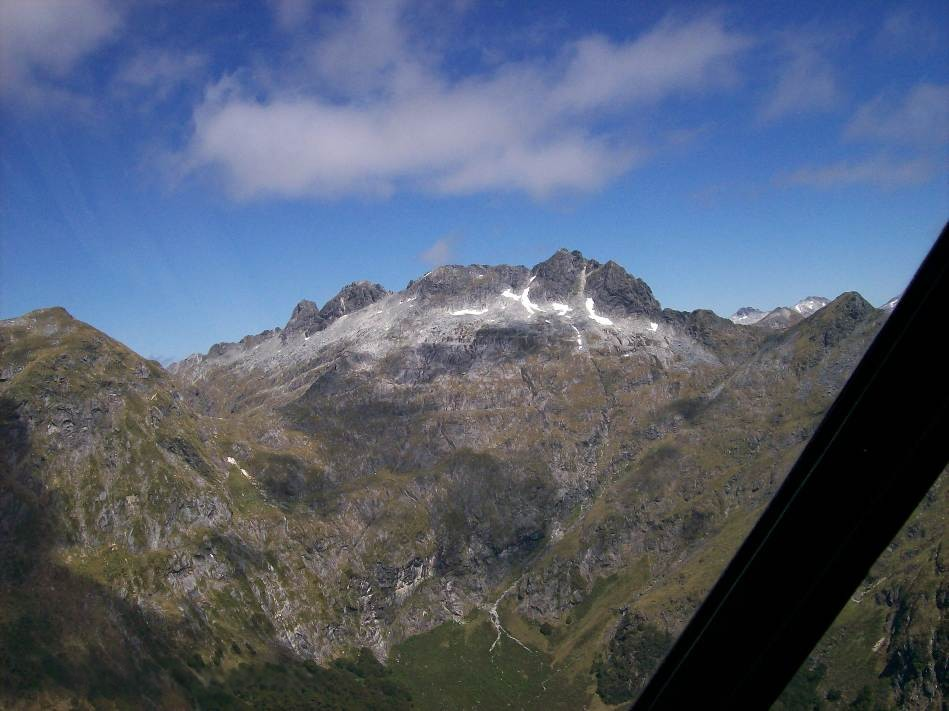 Mountain Peak